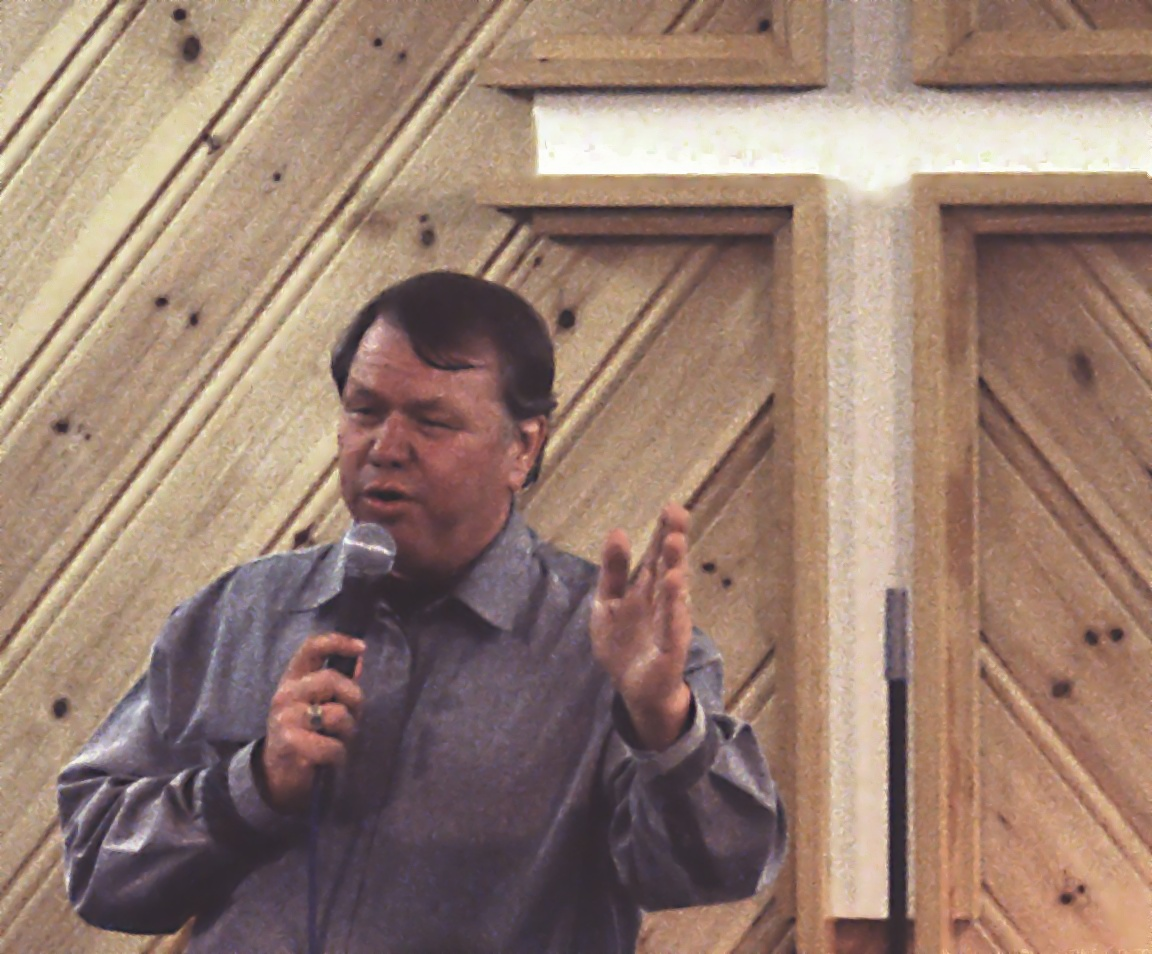 Åge Åleskjær